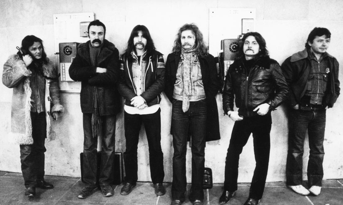 A P. Mobil együttesről készült csoportkép a Marx téren (ma Nyugati tér). Balról jobbra: Tunyogi Péter, Schuszter Lóránd, Zeffer András, Sárvári Vilmos, Kékesi László, Marecky István